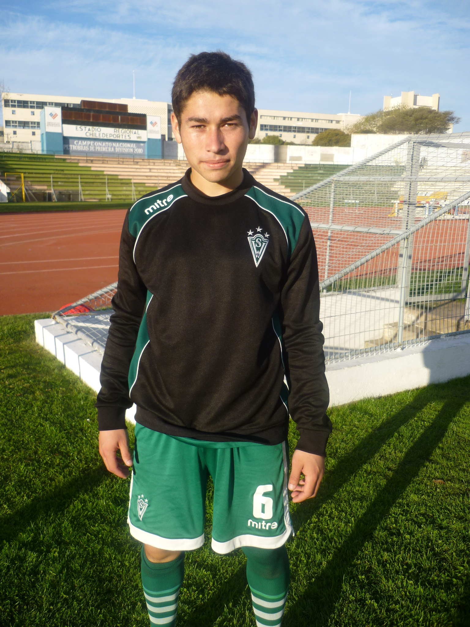 Fotografía de Óscar Opazo, jugador del Santiago Wanderers de la Primera División de Chile.